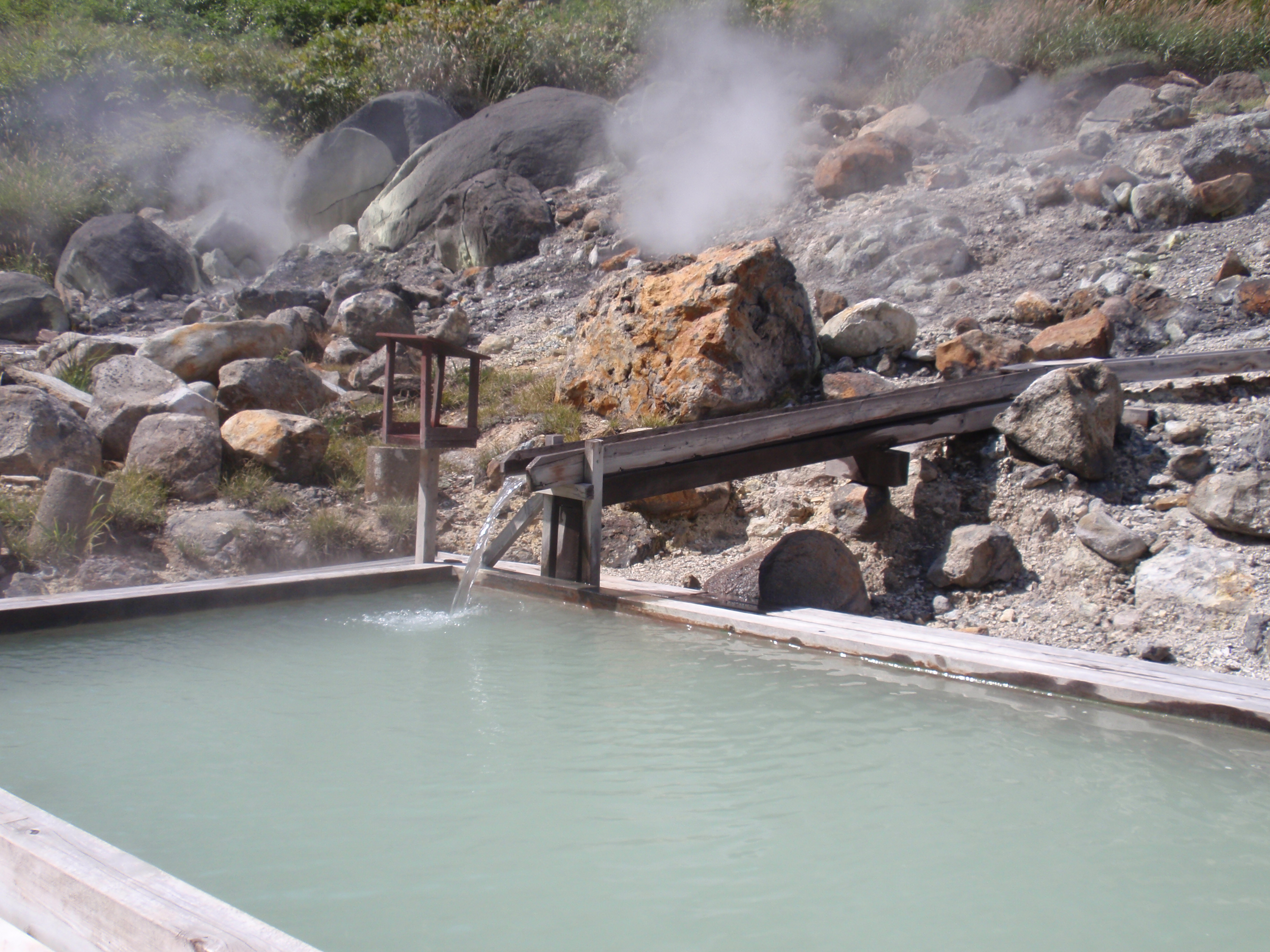 ふけのゆ温泉露天風呂